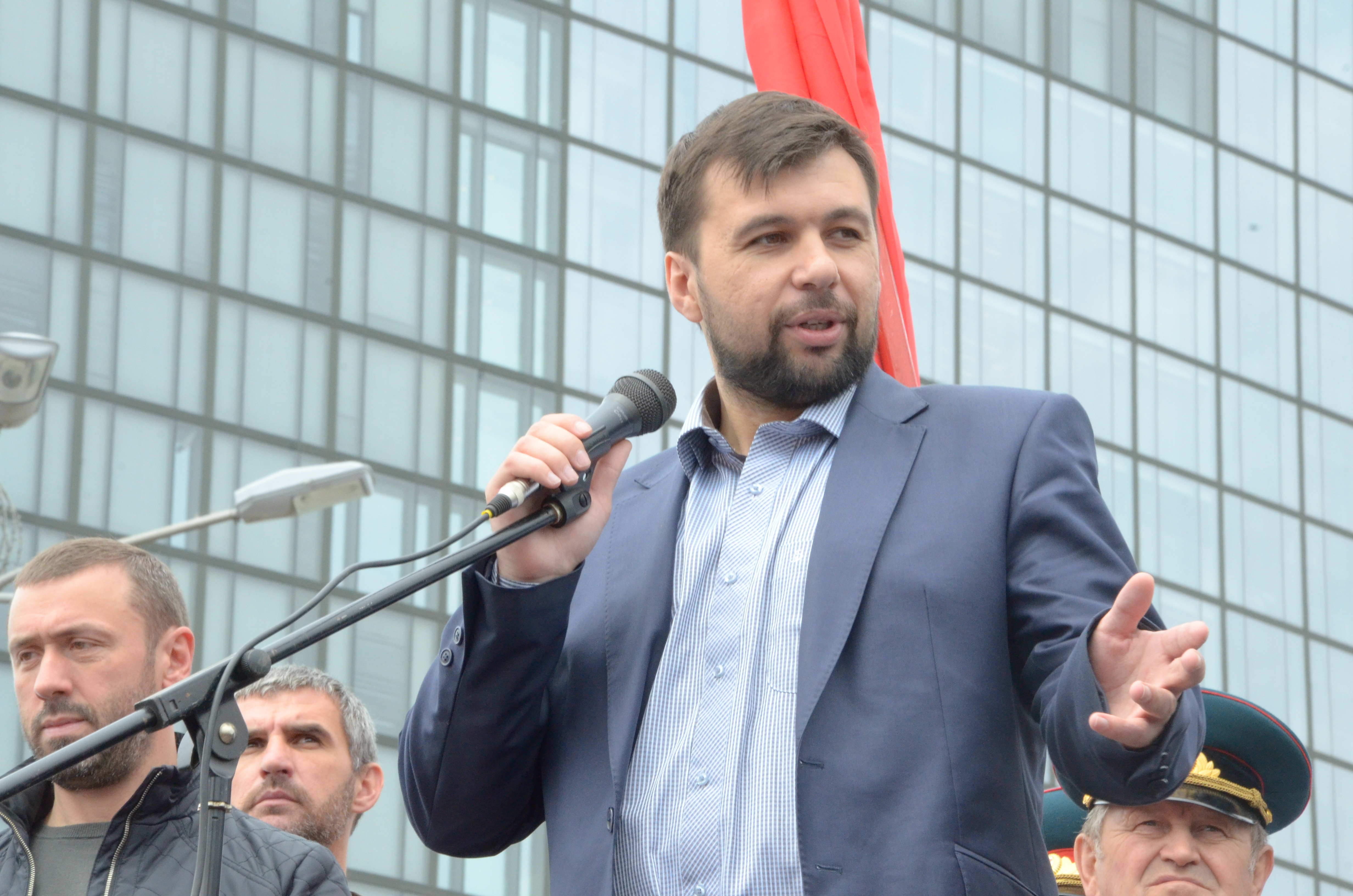 День Победы в Донецке